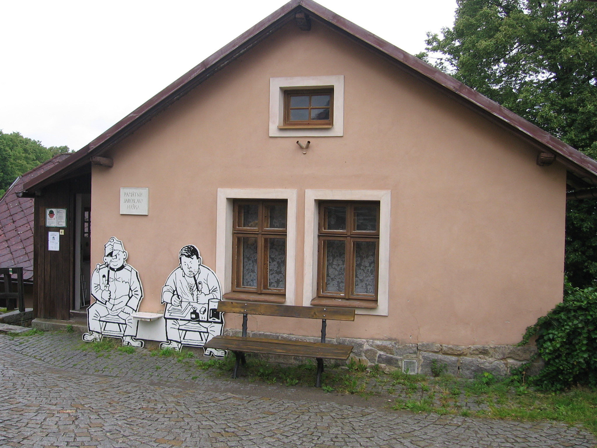 Rodinný dům Jaroslava Haška, Lipnice nad Sázavou 185, okr. Havlíčkův Brod